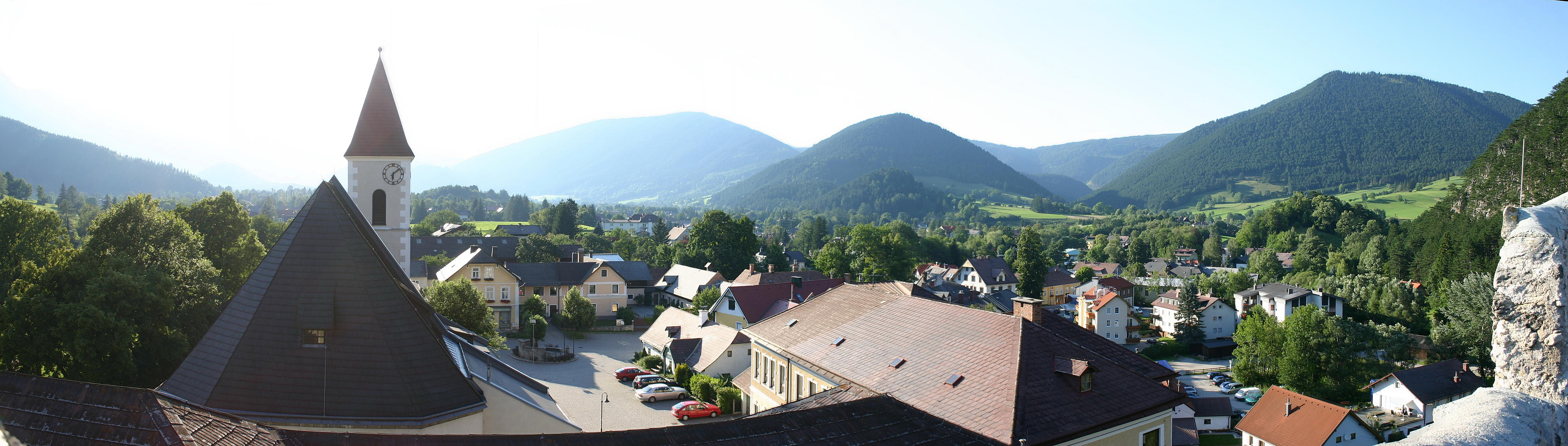 Panorama von Puchberg am Schneeberg